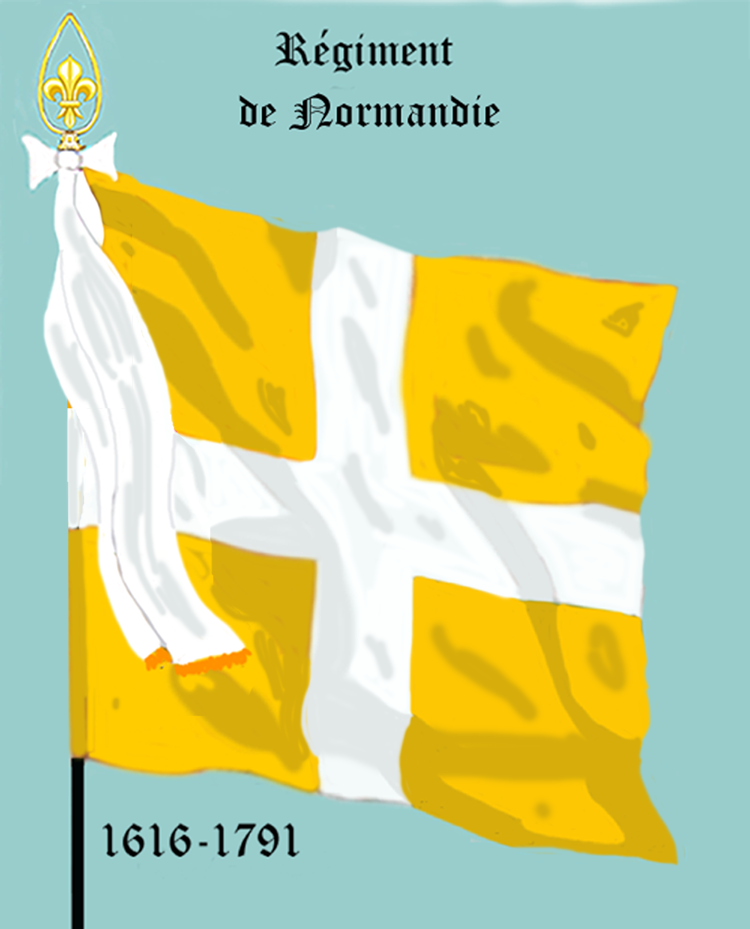 Ordonnanzfahne eines königlich französischen Infanterie-Regiments. - Entnommen und überarbeitet aus: „LES UNIFORMES ET LES DRAPEAUX DE L'ARMÉE DU ROI“ Marseille 1899. (Drapeau d'ordonnance d' un régiment française d'infanterie royale.)